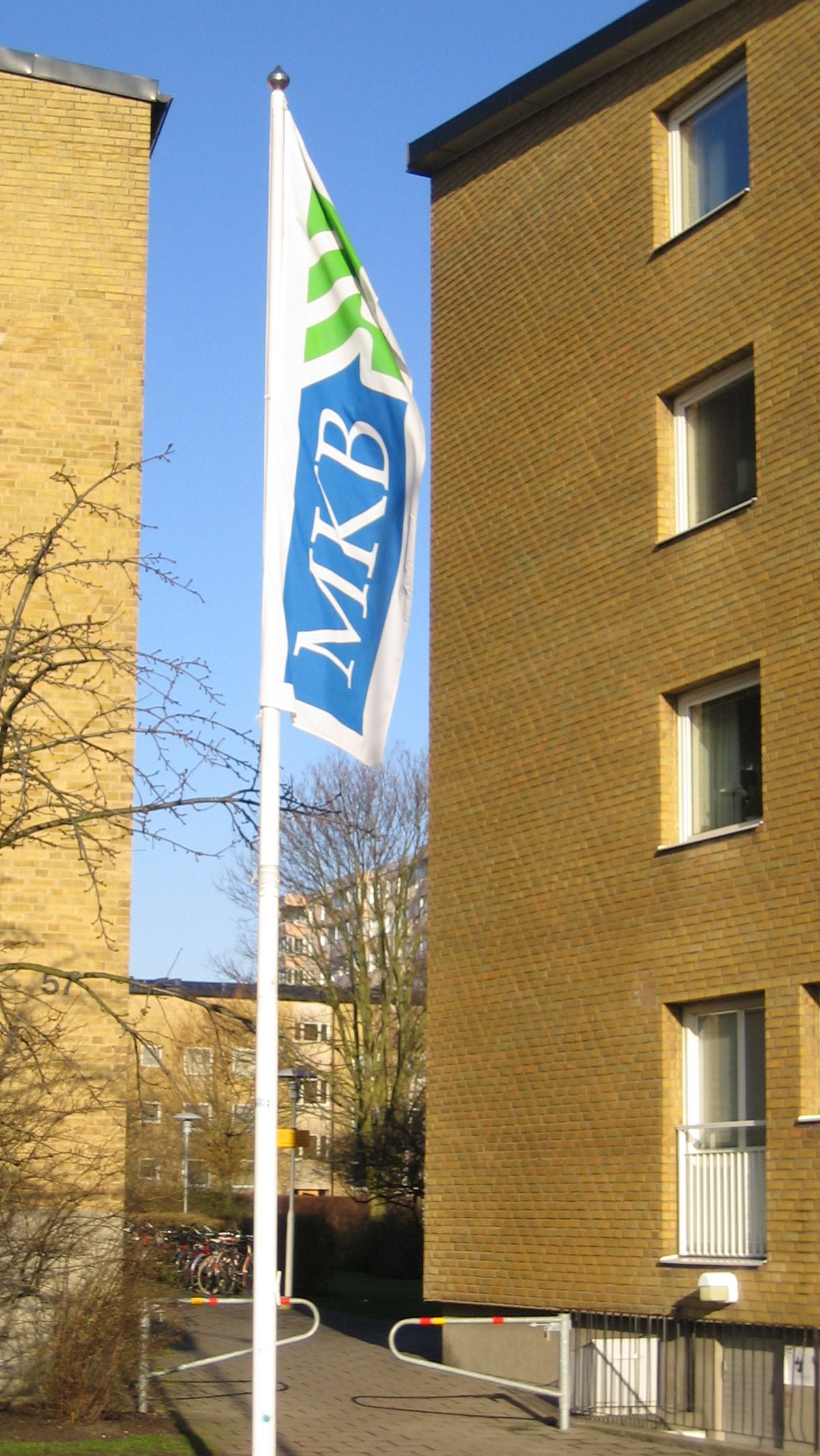 MKB, Malmö